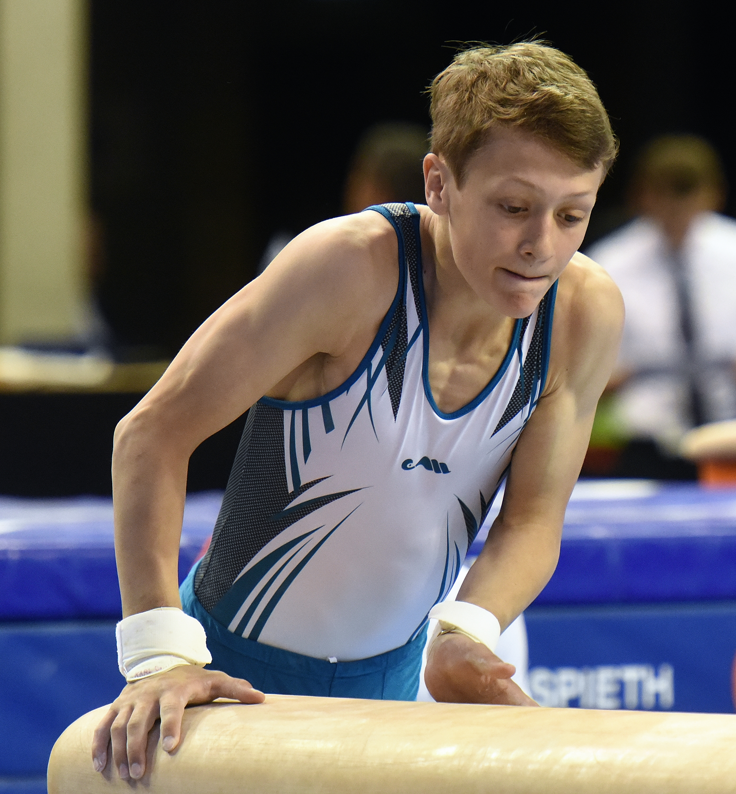 Deutsche Jugendmeisterschaften Gerätturnen männlich AK 13/14 Einturnen Pflicht beim Internationalen Deutschen Turnfest Berlin 2017. Abgebildet: Karl Ornowski.